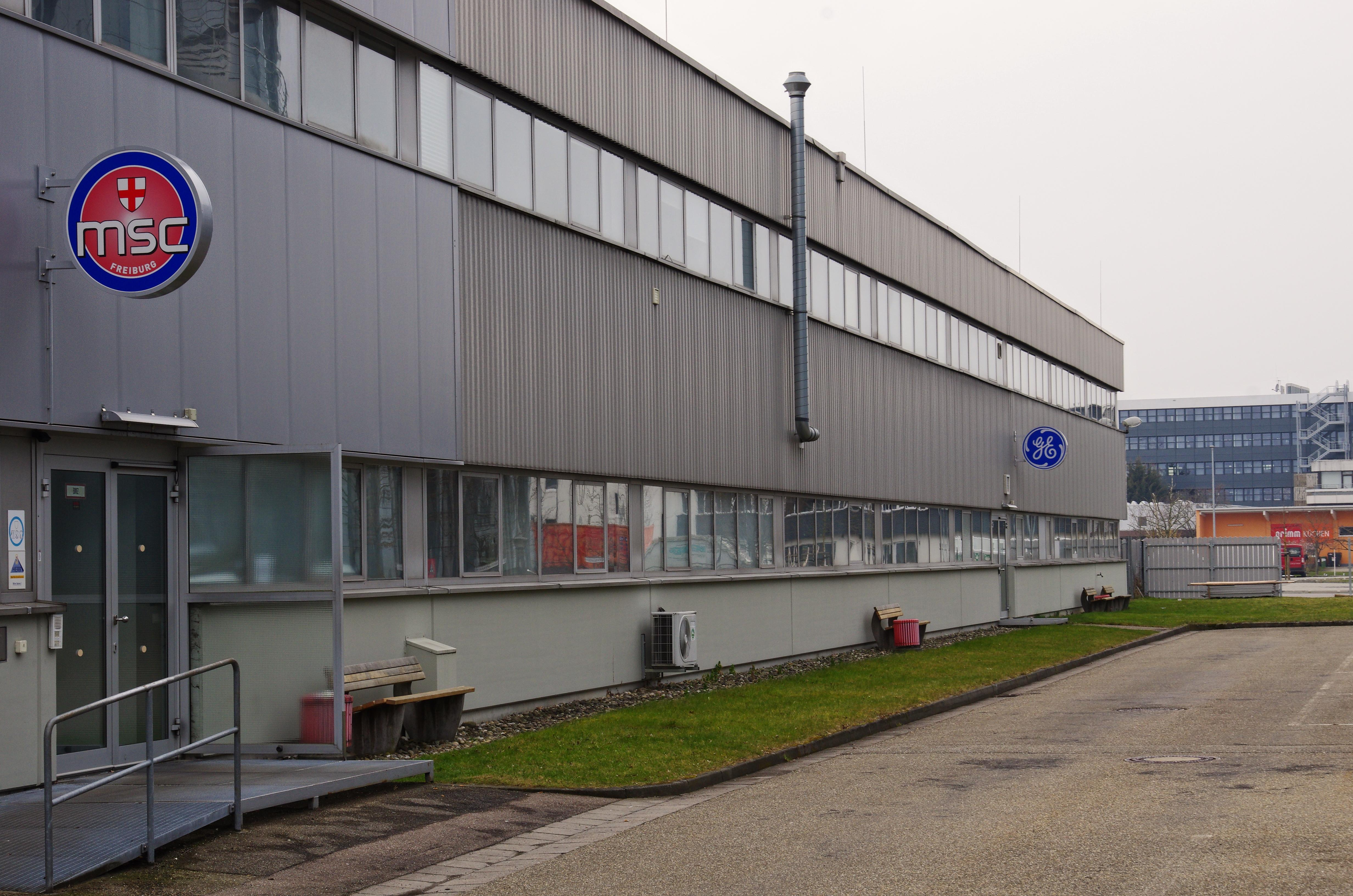 Hellige, jetzt General Electric